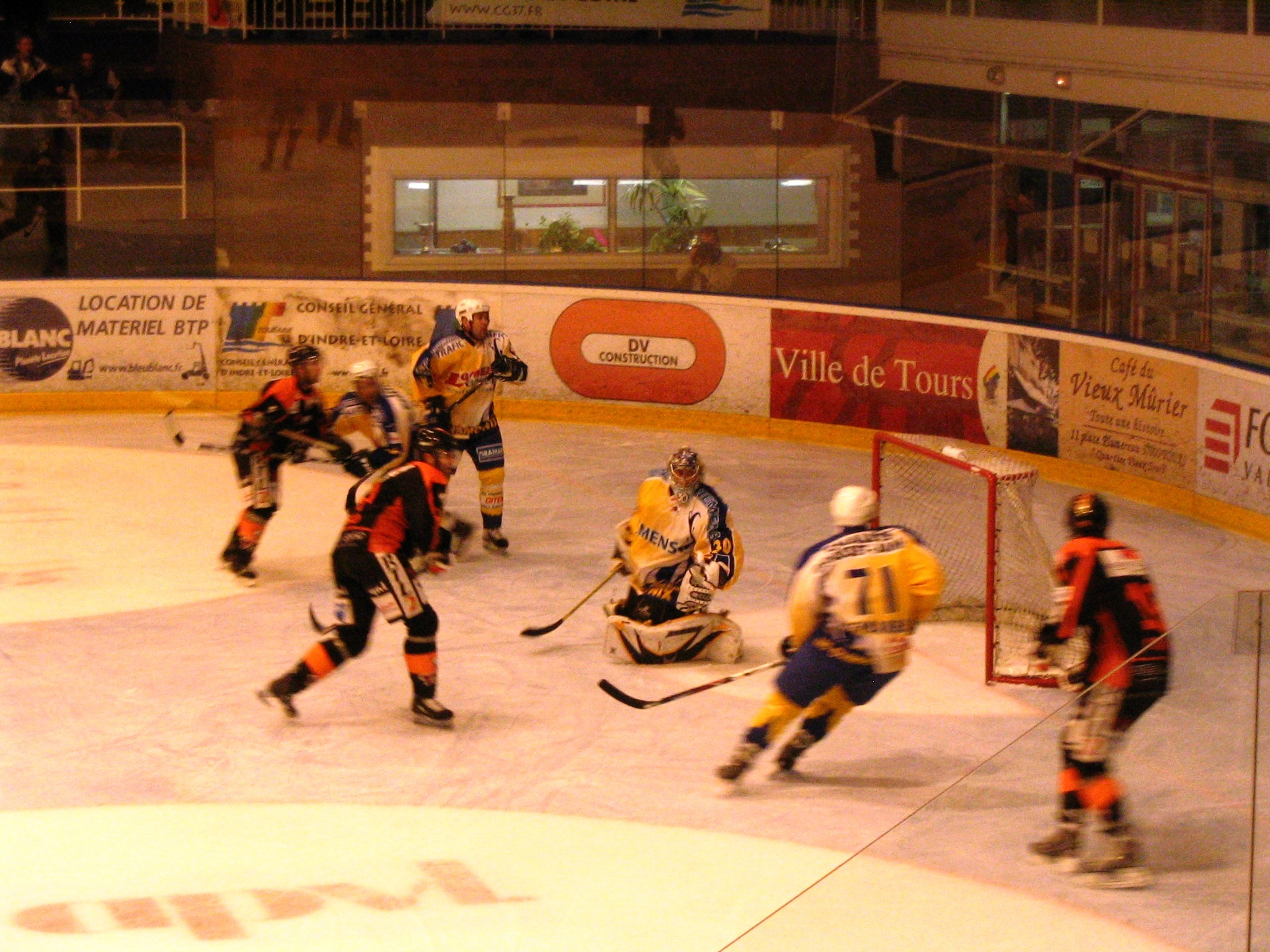 Match Diables noirs de Tours vs Chamois de Chamonix